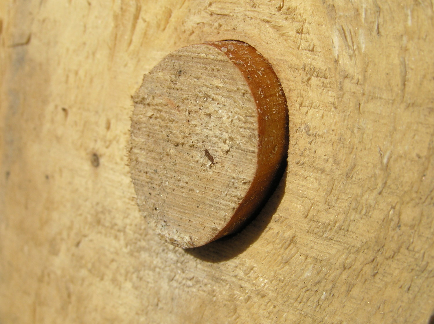 sęk niezrośnięty (wypadający)